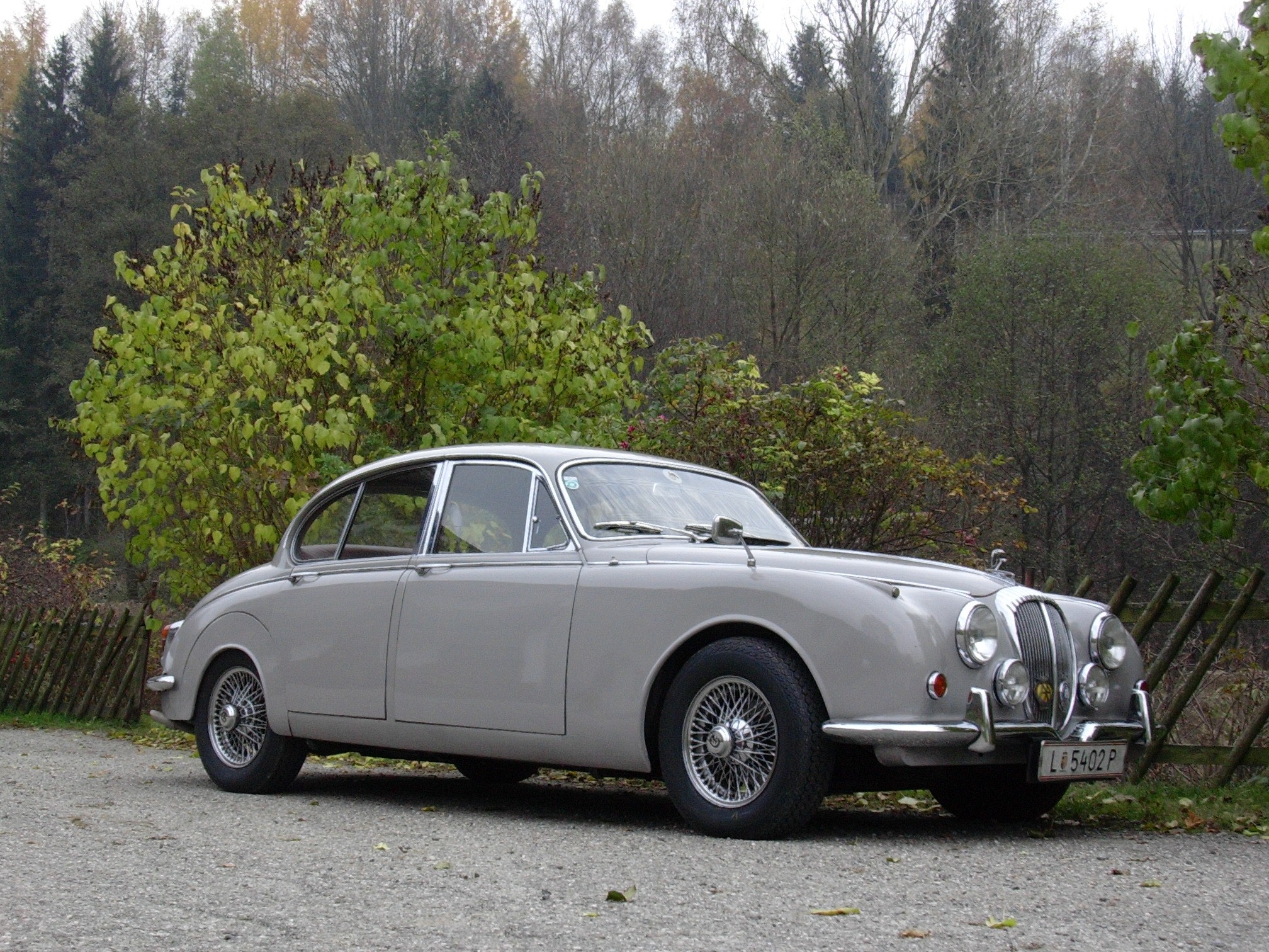 Daimler V8-250, 2648ccm, 145 PS, Fotografiert von Benutzer "Newfoundlanddog" 2005